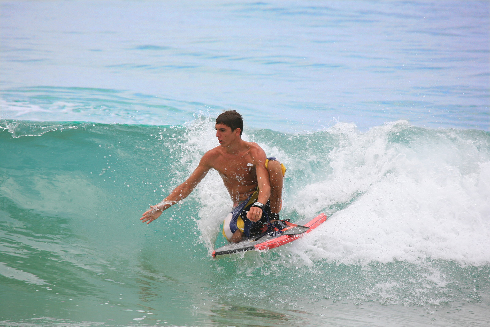 Bodyboarding in Salema Portugal 2006